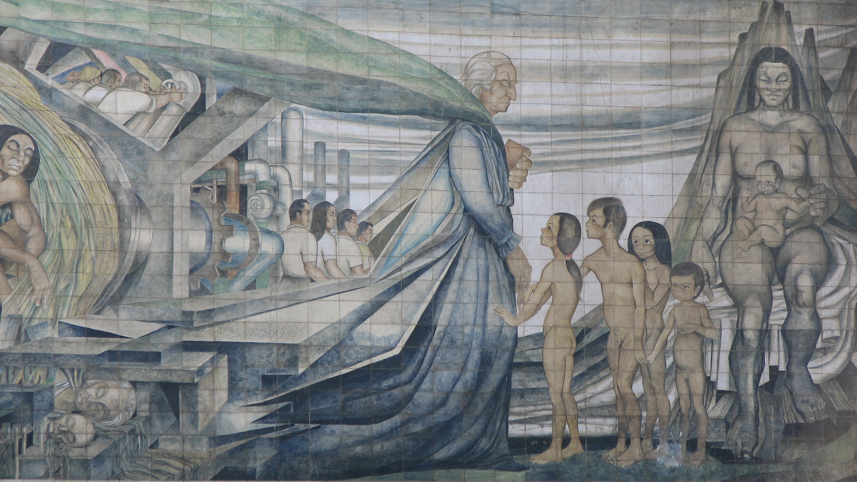 Mural en cerámica de Fernando Daza en homenaje a Gabriela Mistral, ubicado a los pies del Cerro Santa Lucía.